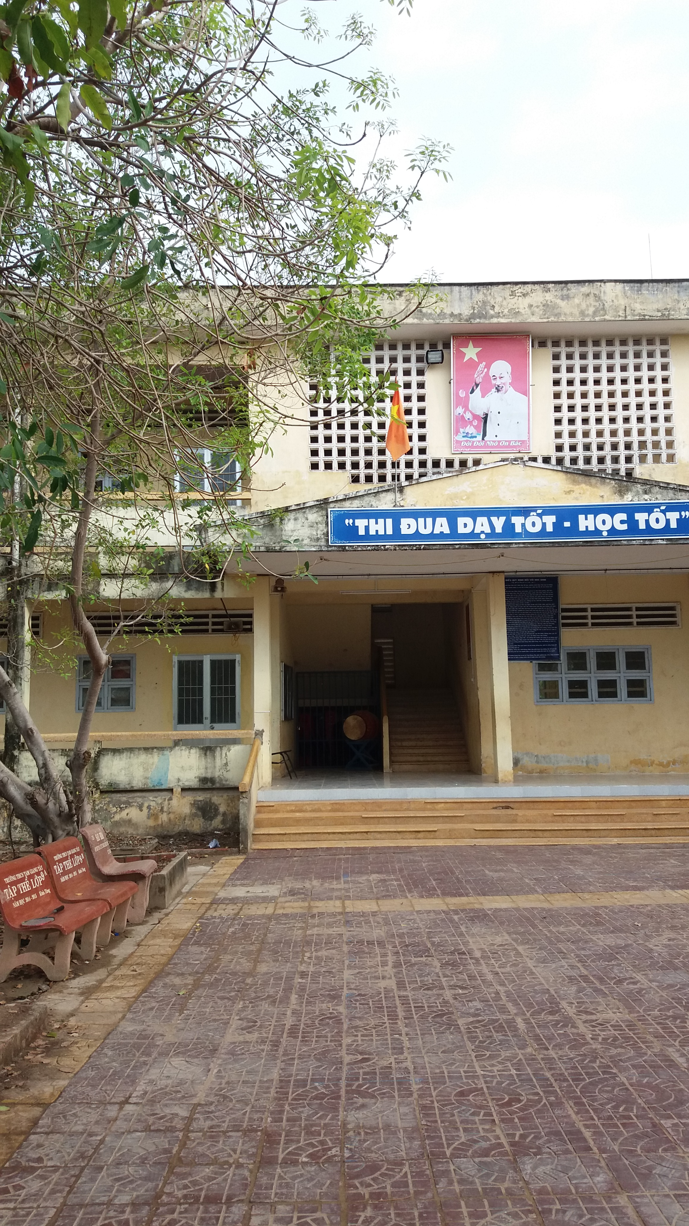 Trường Trung học cơ sở Tam Giang Tây, Ngọc Hiển